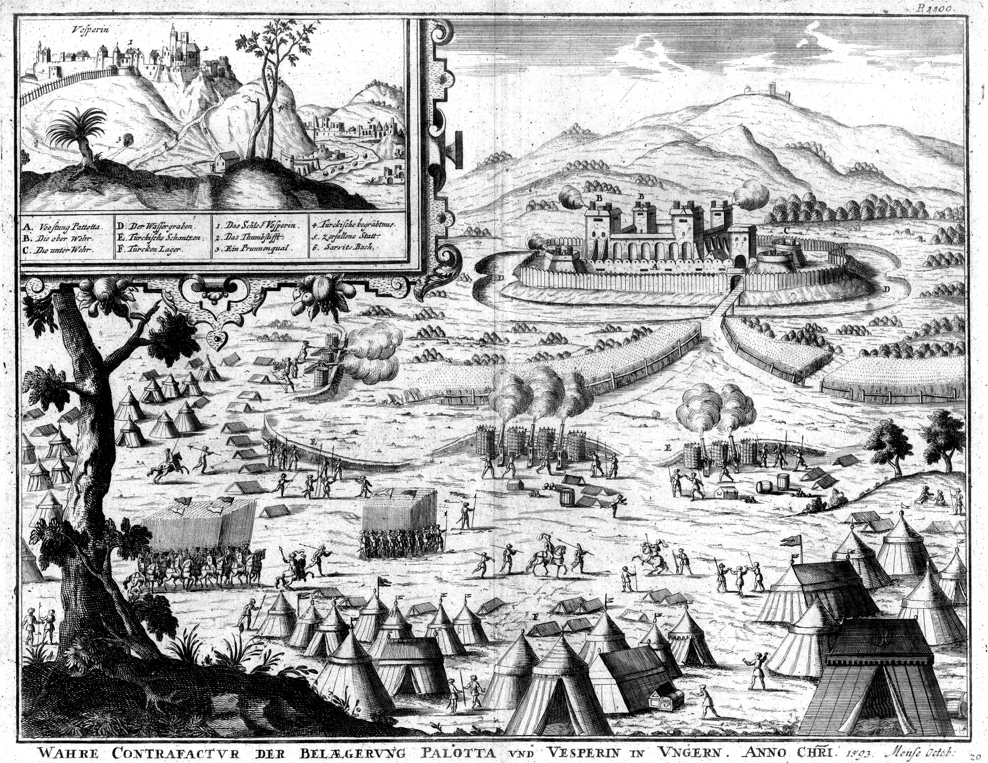 Gesamtansicht, mit Darstellung der Belagerung 1593, " Wahre Contrafactvr der Belaegervng Palotta vnd Vesperin in Vngarn. Anno Chri. 1593. Mense Octob. ", links oben Ansicht der Stadt Veszprem.